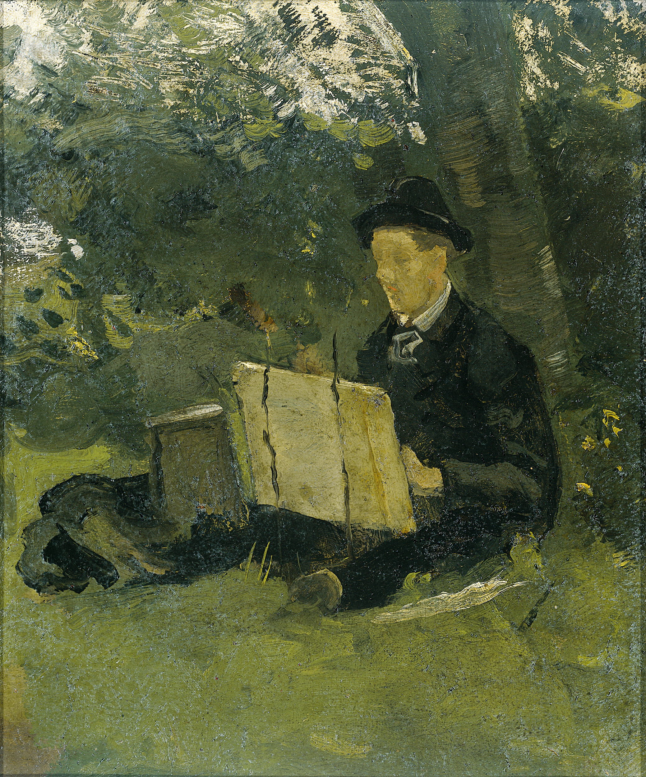 Portret van Jan Verkade (1868-1946) schilderend onder een boom. Zittend op de grond met een bord op de knieën, Hattem 1891.